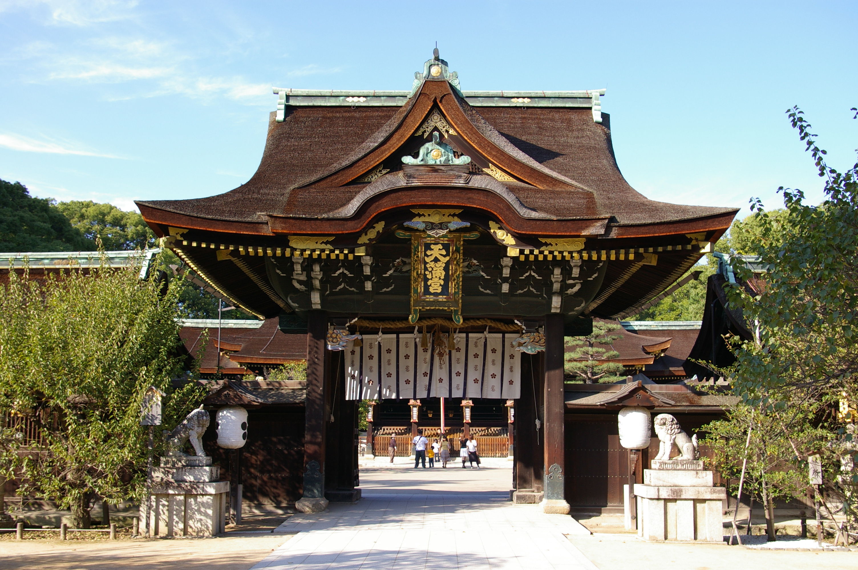 Kitano-tenmangu